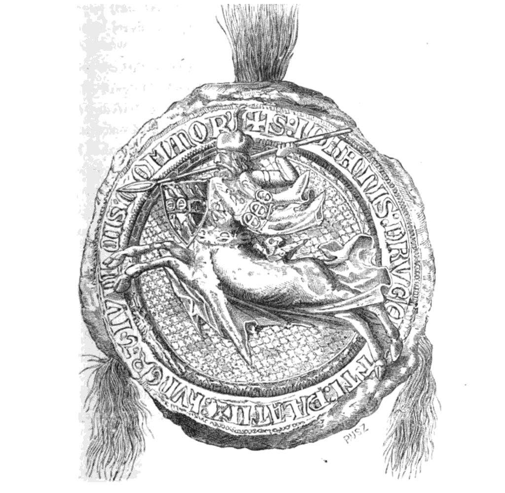 A homonnai Drugeth család címere, egyik őse János, 1330 körül nemcsak nádora volt az országnak, hanem Ung megyének a főispánja is.